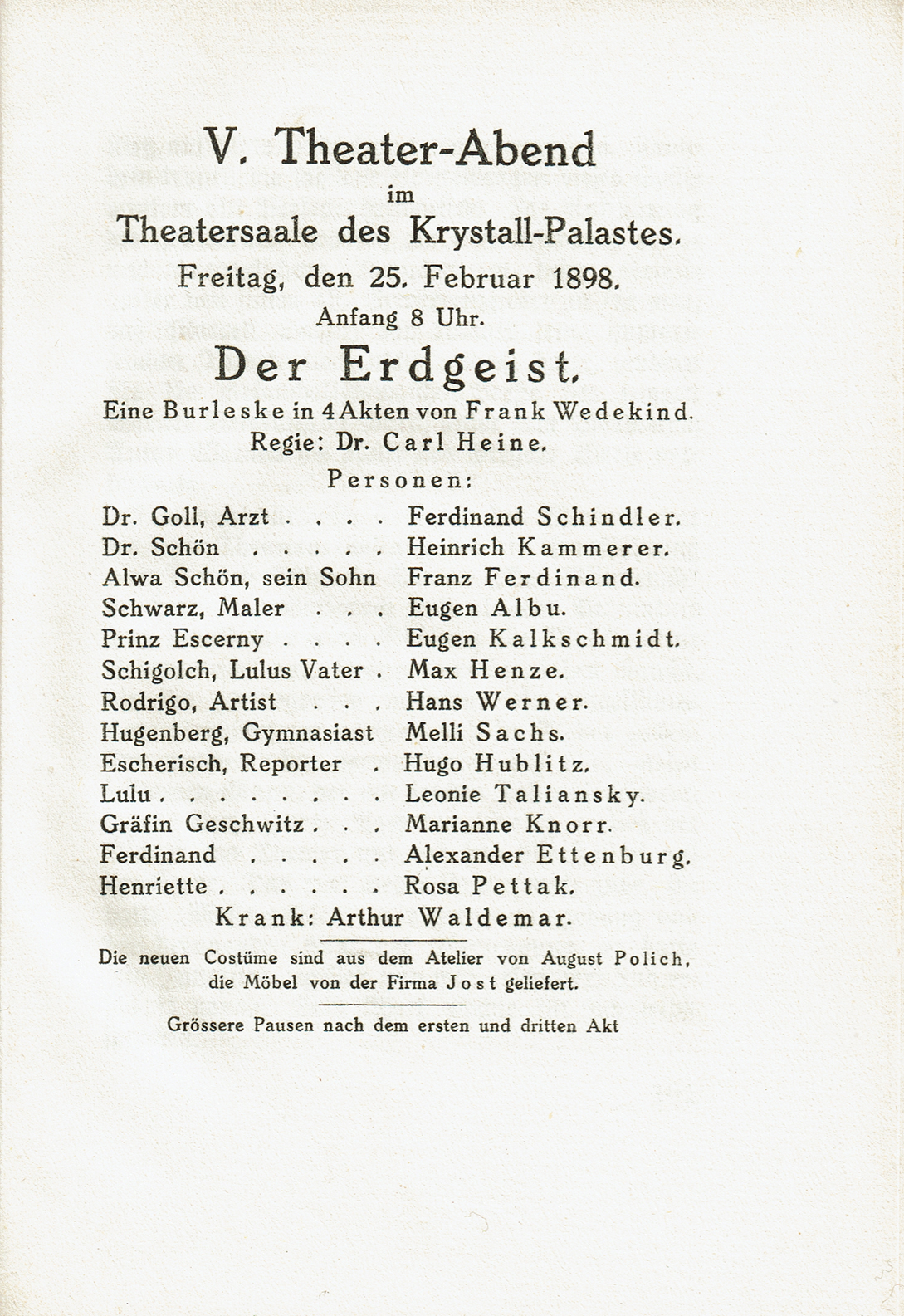 Theaterzettel der Uraufführung von Frank Wedekinds "Erdgeist" im Jahr 1898 (Nachdruck von 1923)